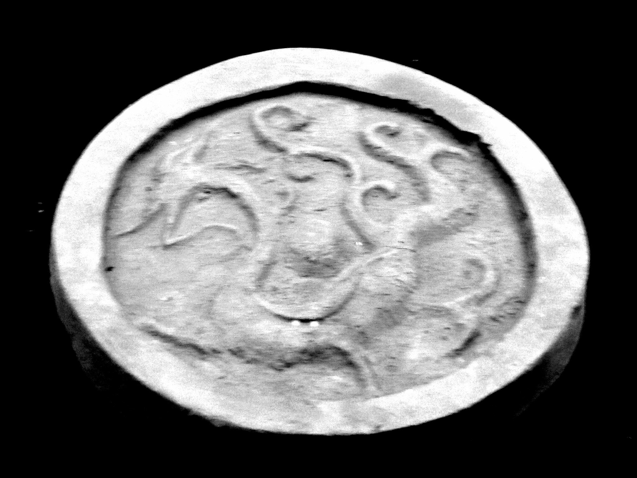 瓦当上的zh:青龙 拍摄